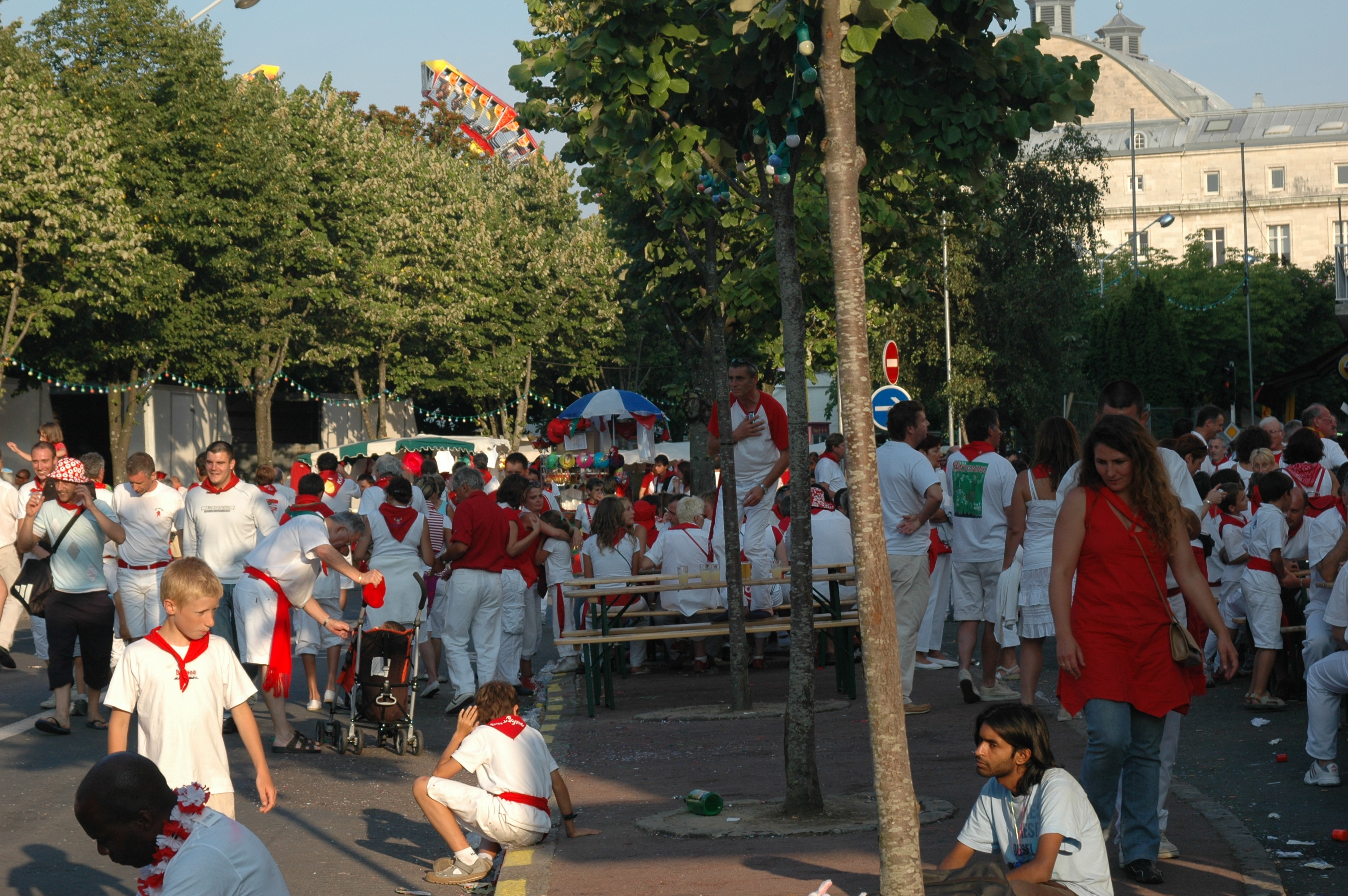 Bayonne, rassemblement de festayres pour les fêtes de Bayonne 2006. Photo prise le 06/08/06 par Harrieta171